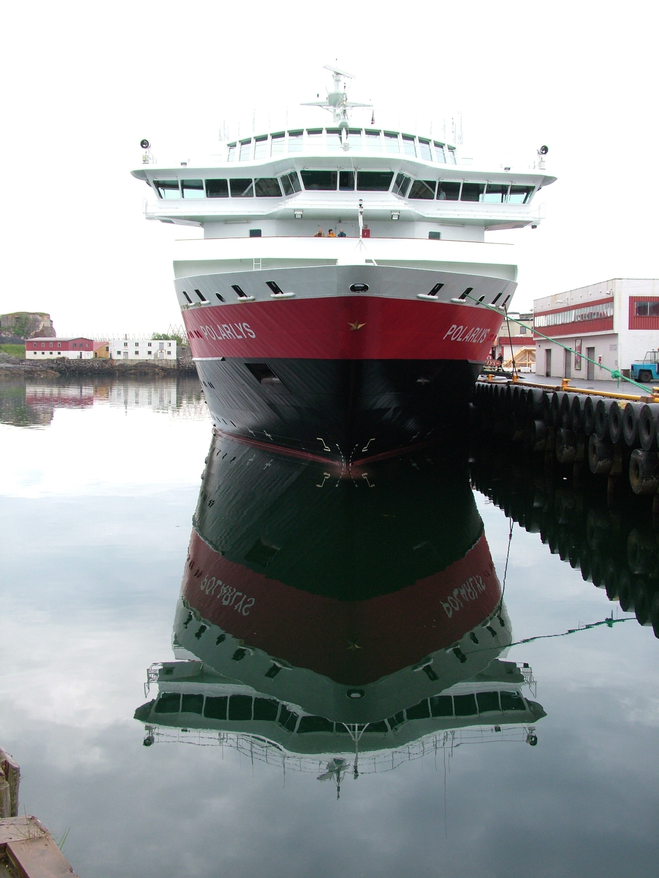 MS Polarlys, ein Hurtigruten Schiff im Hafen von Solvaer